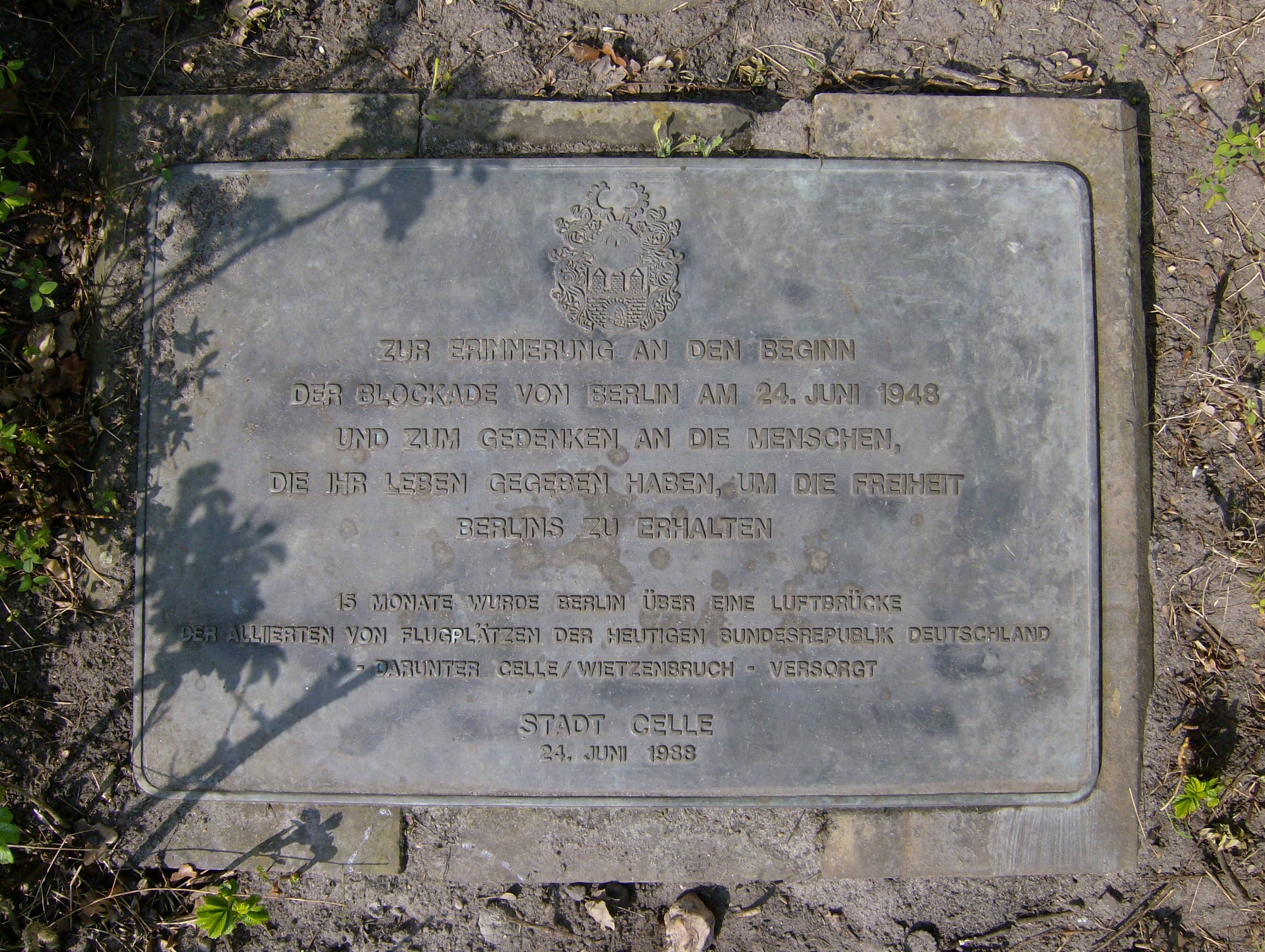 Abbildung der Gedenktafel am Sockel des Luftbrückendenkmals in Celle